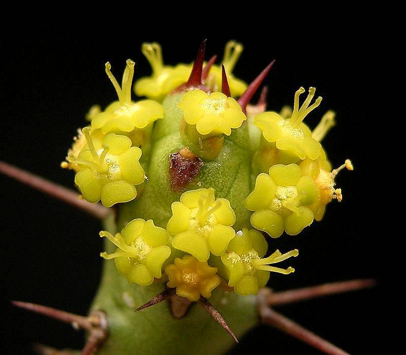 Euphorbia fascicaulis